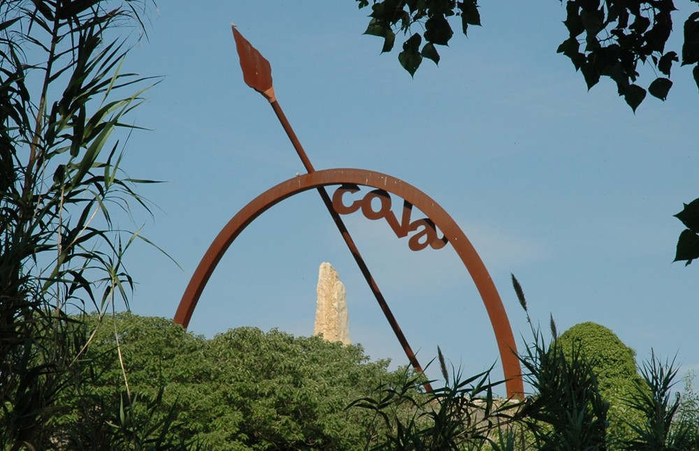 Coves de l'Espluga de Francolí